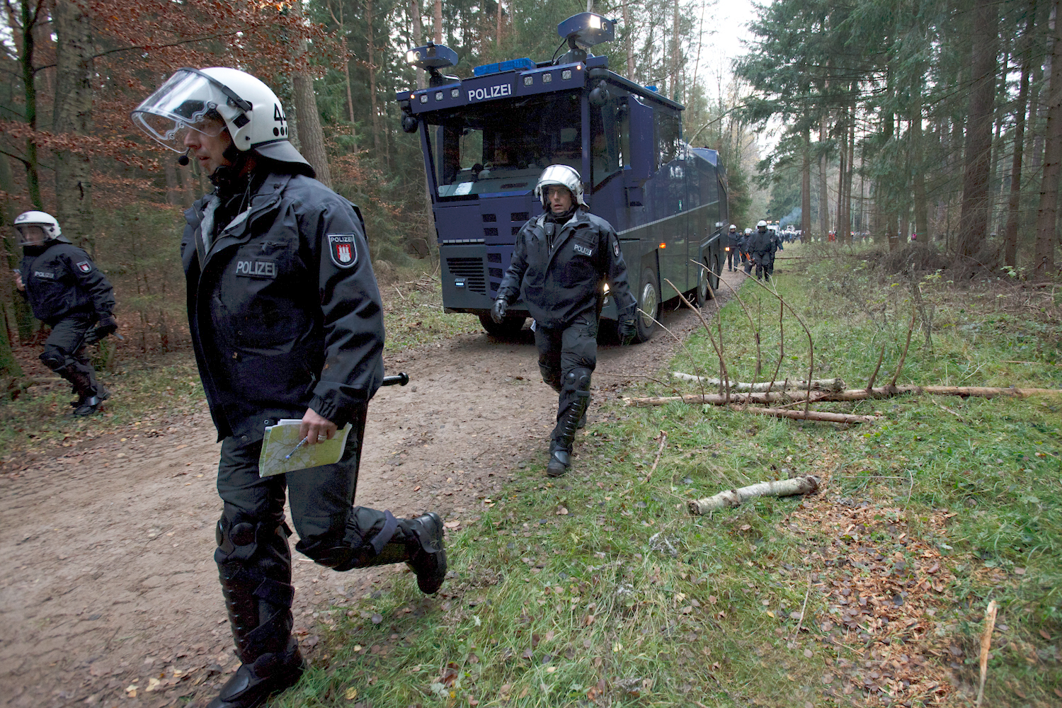 Proteste gegen den Castor-Transport an den Schienen bei Metzingen: Polizei Wasserwerfer